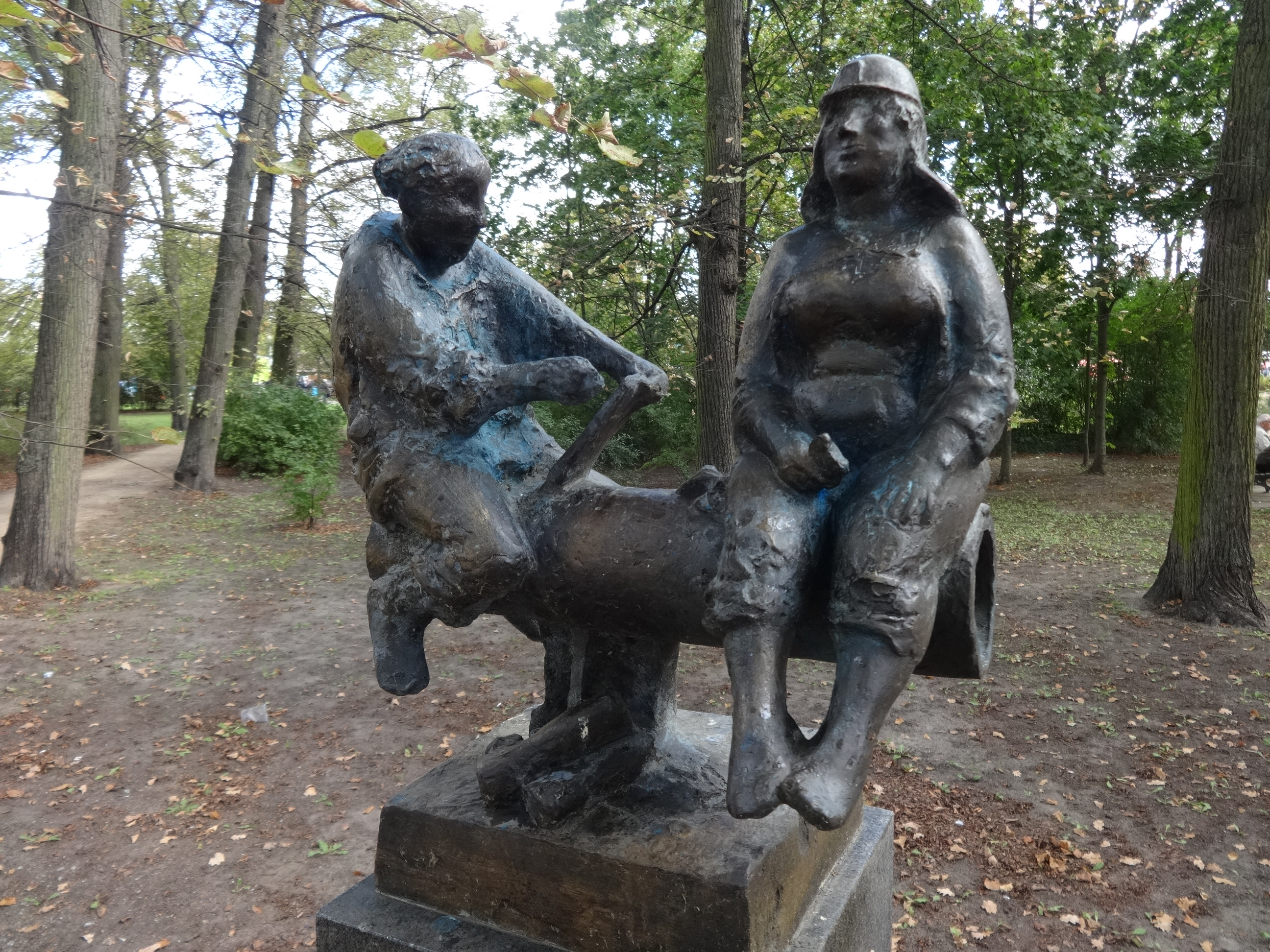 Der Stadtpark in Schwedt/Oder ist eine Grünfläche in der Altstadt, die 1978 auf dem ehemaligen städtischen Friedhof angelegt wurde. Auf dem Gelände befinden sich mehrere Skulpturen von Schwedter und auswärtigen Künstlern aus den Jahren 1961 bis 2010.